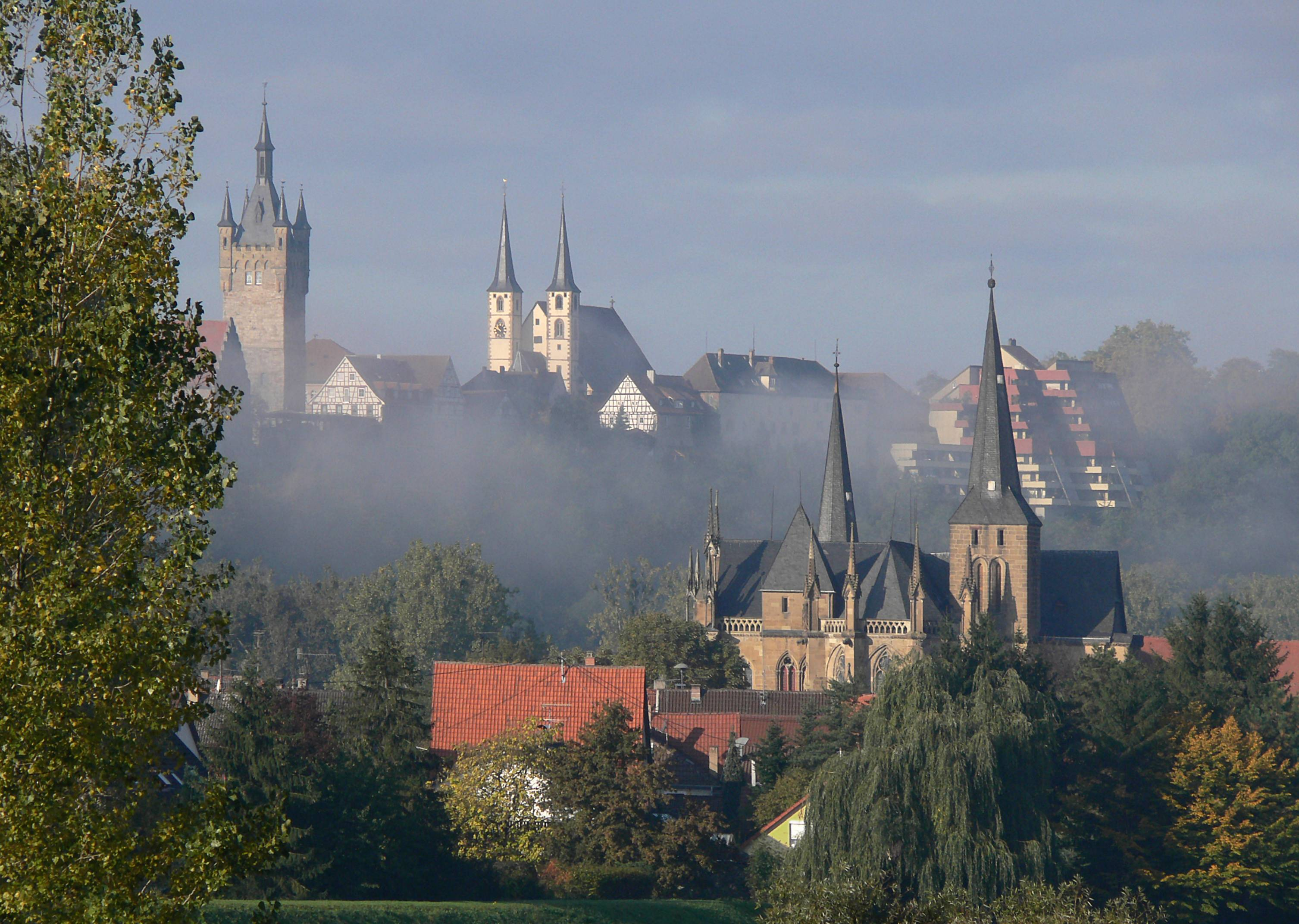 Bad Wimpfen, Baden-Wuerttemberg, Germany; foreground: St. Peter Wimpfen im Tal; background: Wimpfen am Berg